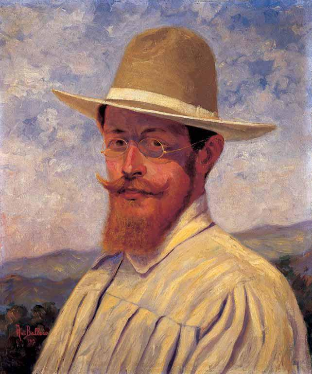 Antonio Ballero, pittore